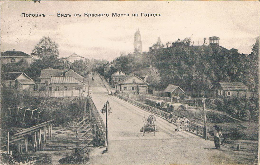 Беларуская (тарашкевіца): Полацак (Połacak), Чырвоны мост (Čyrvony)